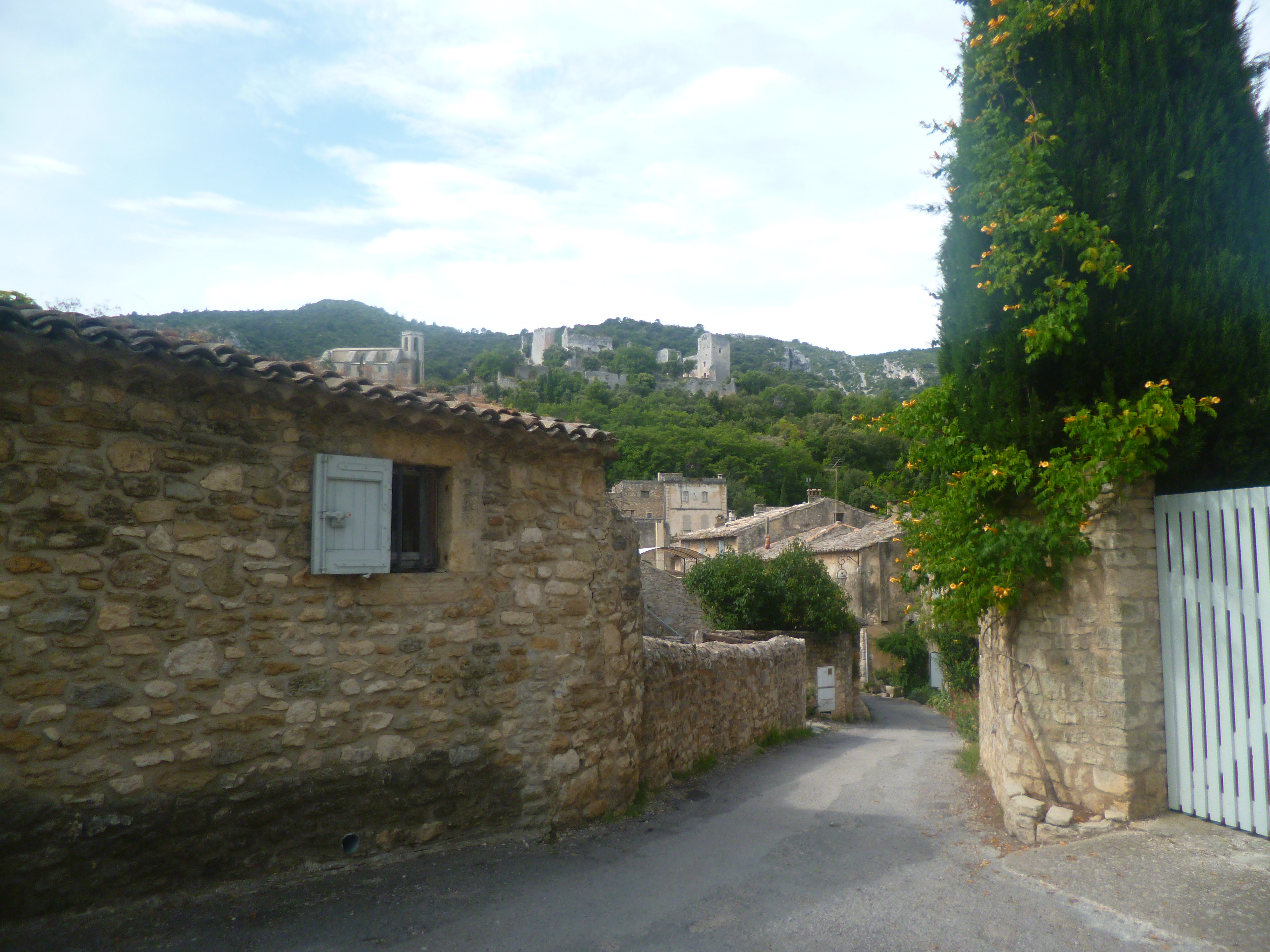 Oppède-le-Vieux c'est le vieux village d'Oppède il fut ravagé par le séisme de 1731 et ne s'est jamais vraiment reconstruit depuis en témoigne le château dont les restaurations ont à peine commencées en 2015. Le village a été déserté au début du XXe siècle et à été repeuplé par des artistes amoureux après la Seconde Guerre Mondiale. L'ancienne collégiale Notre Dame Dalidon est en restauration depuis plus de 20 ans, à ce titre un festival a lieu chaque année pour pouvoir la restaurer, présidé par Michel Leeb le mécène du village. L'église et le château deux symboles du pouvoir féodal.